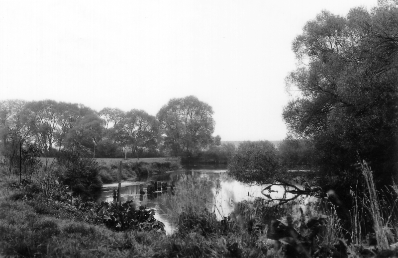 Die Eger bei Tirschnitz